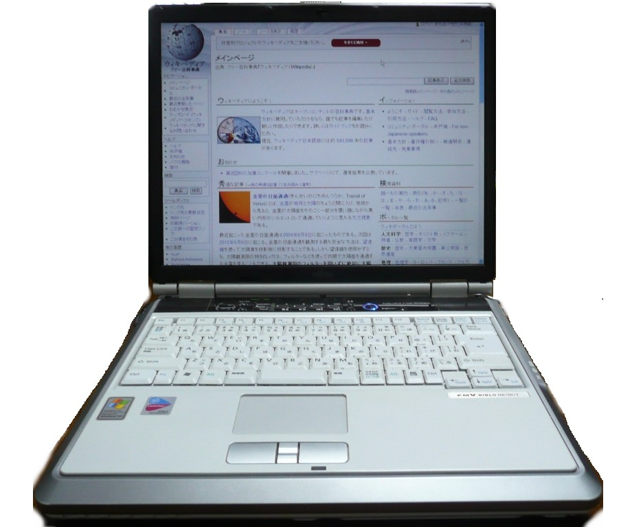 Fujitsu FMV-BIBLO NB75K/T.